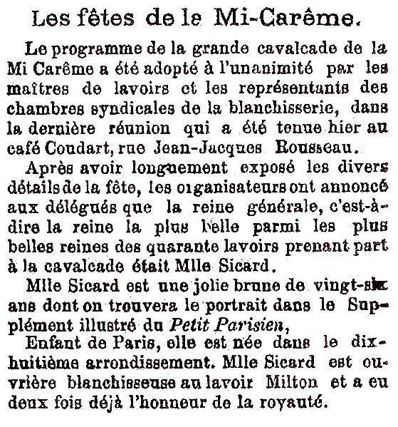 Annonce de l'élection de la Reine des blanchisseuses 1891 à Paris pour la Mi-Carême.